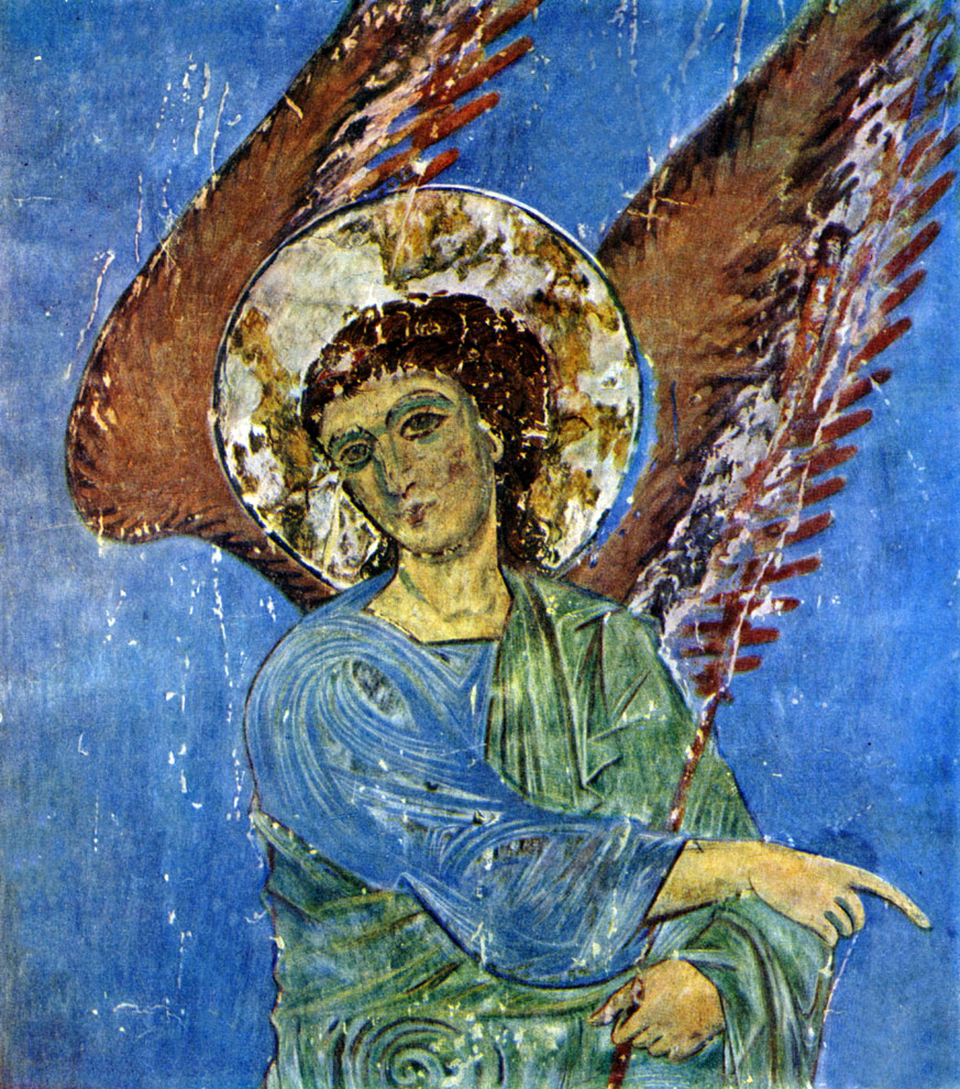 Ангел. Фрагмент фрески храма Кинцвиси. Конец 12 - начало 13 вв.